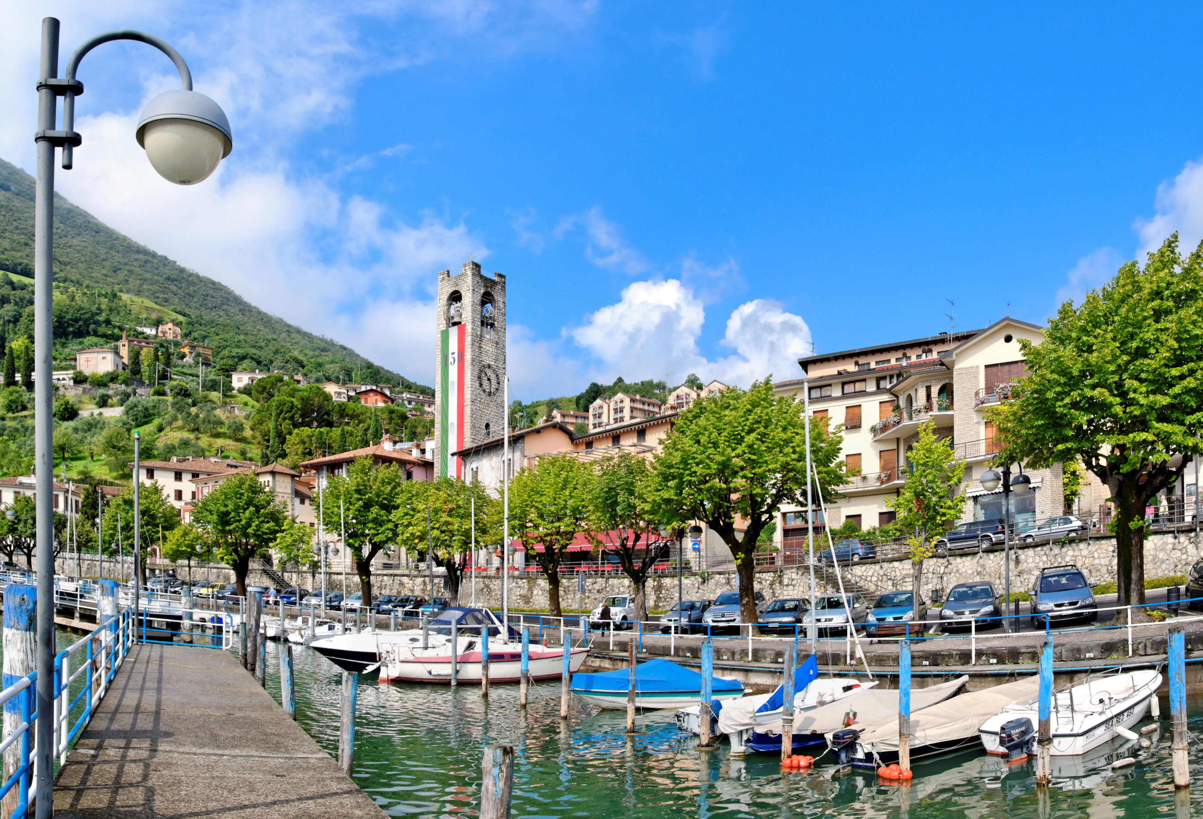 Tavernola Bergamasca. Il lungolago.